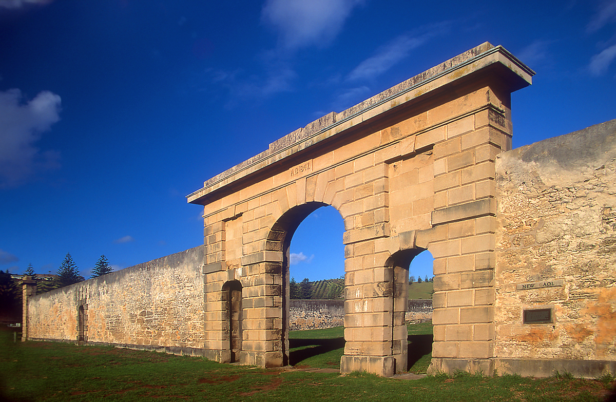 Norfolk Island jail.